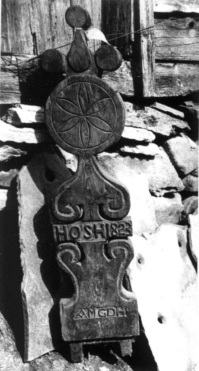 Kallhovde datert 1823 fra Fusa i Hordaland.